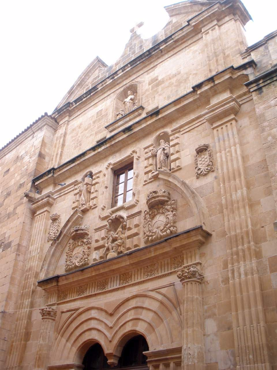 Convento de la Trinidad (Salamanca)